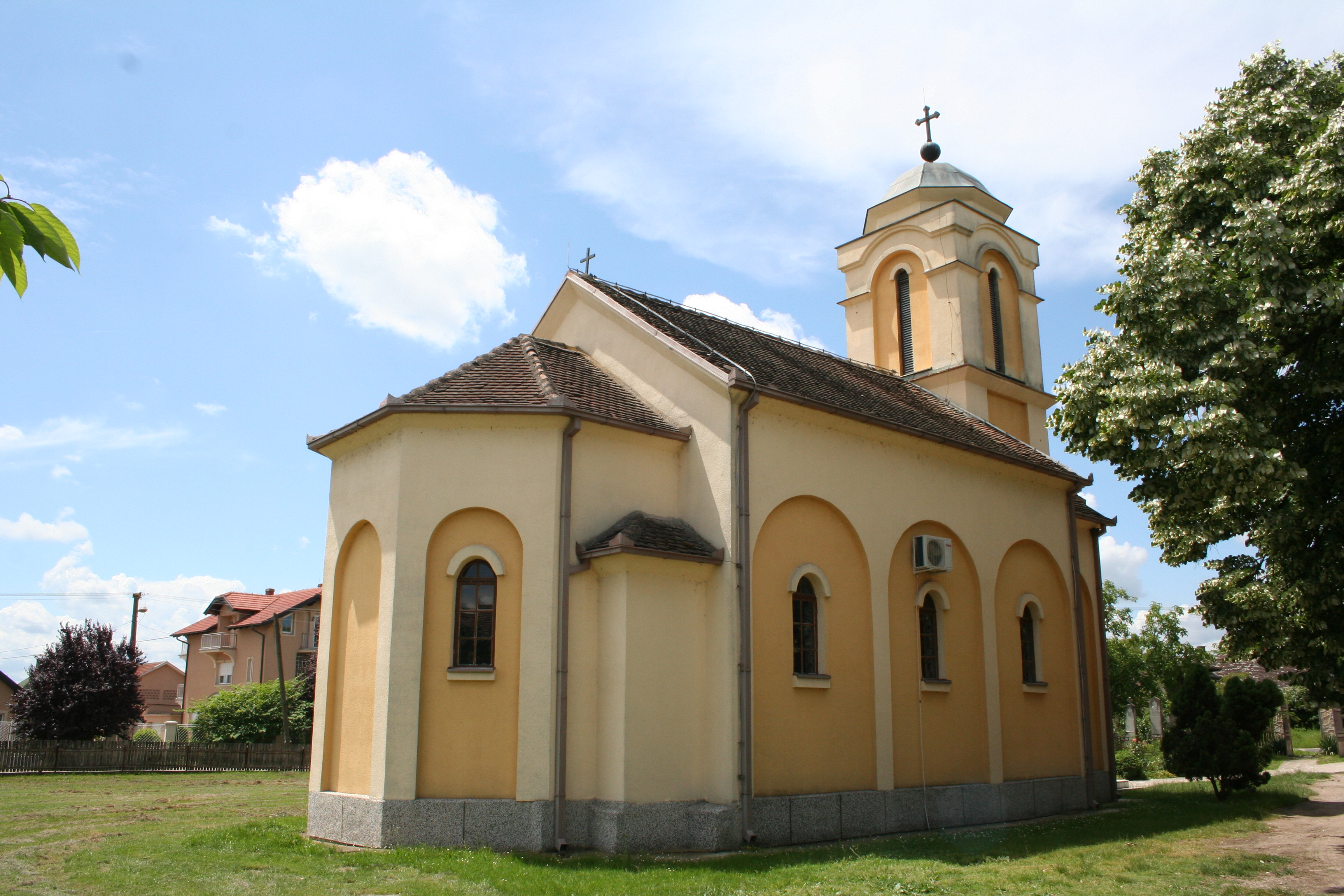 Crkve u selu Provo, opština Vladimirci